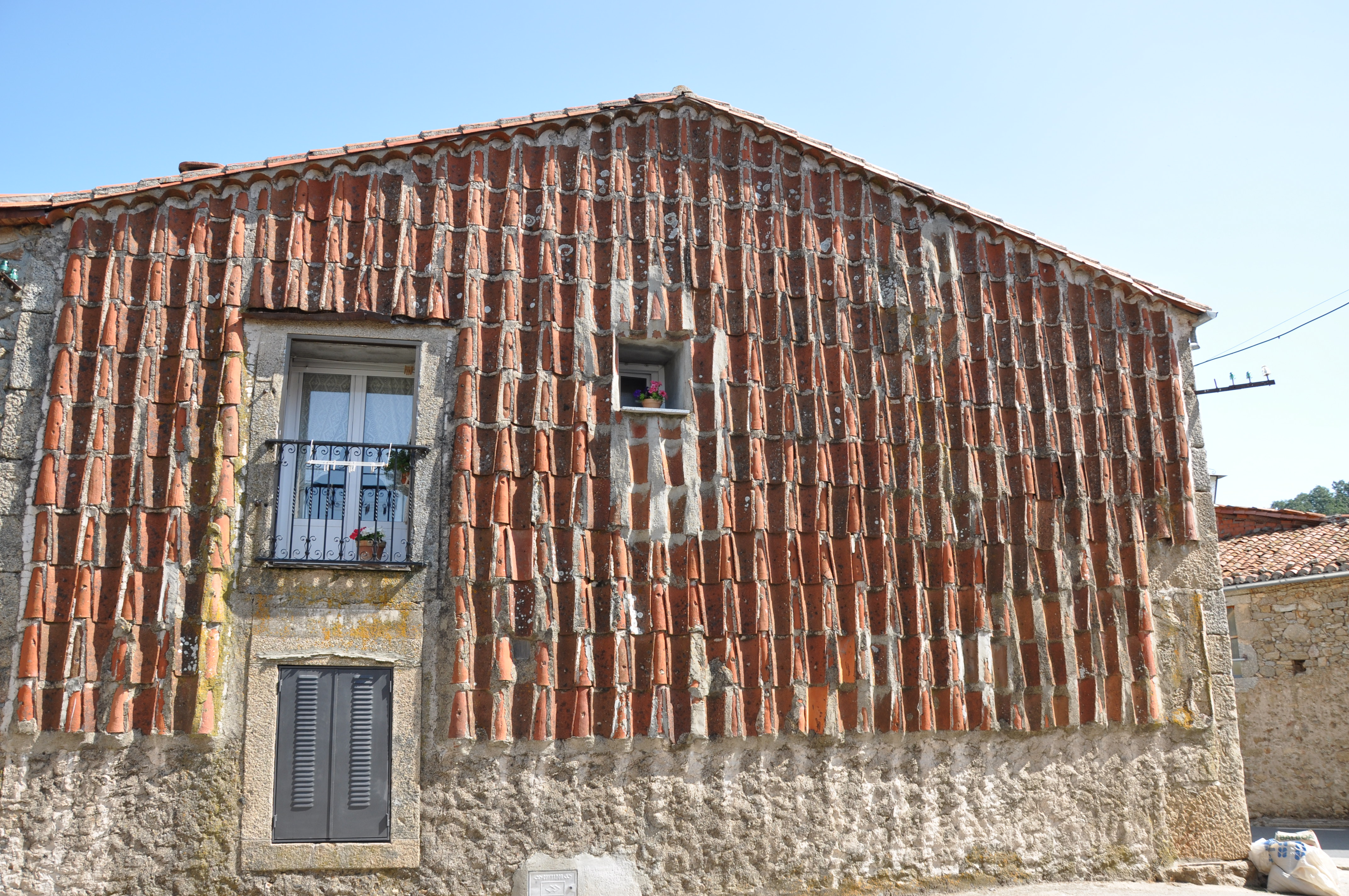 Pared protegida por tejas en Umbrías, Ávila, España